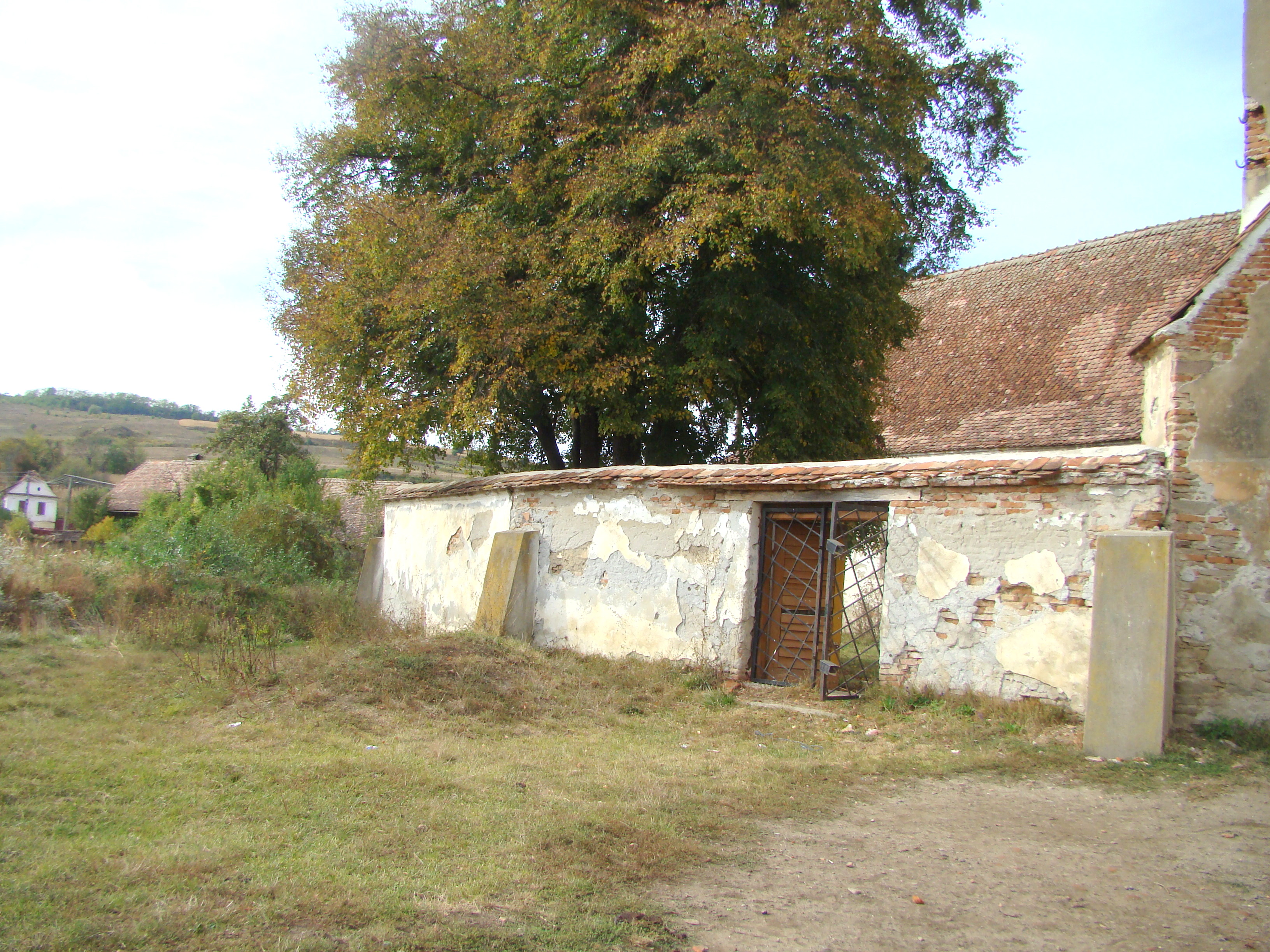 Ansamblul bisericii evanghelice, sat Ormeniș; comuna Viișoara Str. Principală 204 sec. XVI - XVIII